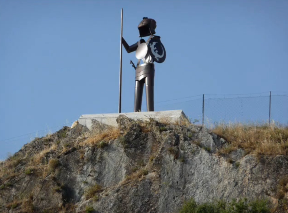 Escultura en hierro de un guerrero íbero obra de José Ríos en Jaén.